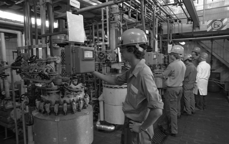 Informationsreise für Journalisten zu Modellprojekten des Bundes. Projekt des Bundesministeriums für Bildung und Wissenschaft. Förderung der Berufsausbildung von benachteiligten Jugendlichen (Benachteiligungsprogramm) bei der Firma Hoechst. 01.-03.09.1982